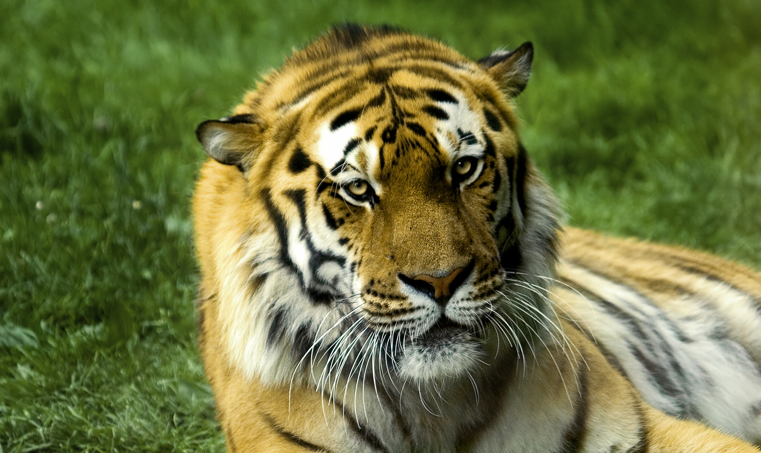 Tigre au zoo de Servion (Suisse)